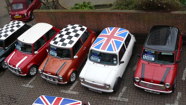 Mini-ature Parking Space